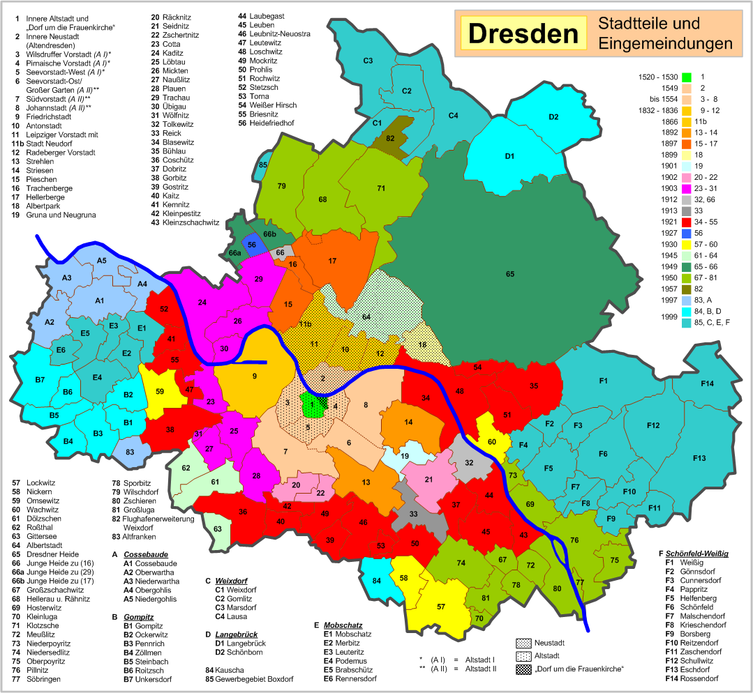 Dresden Stadtteile (Gemarkungen) und deren Eingemeindung, (Parts of the town and Incorporations)